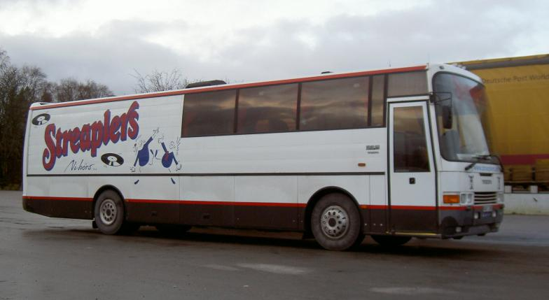 Dansbandet Streaplers' turnébuss (KAY 245).